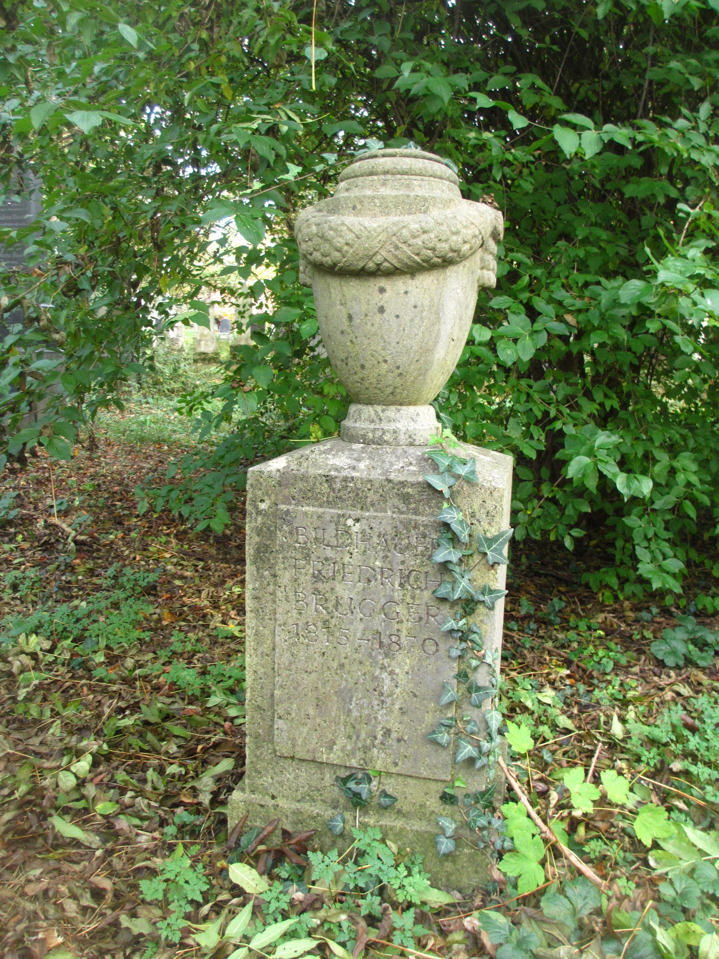 Grab von Friedrich Brugger (1815-1870) auf dem Alten Suedlichen Friedhof in Muenchen-Graeberfeld GF-16-10-26